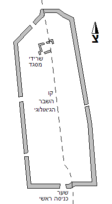 תאור כללי של מצד עתרת.יצרתי והעלתי באפריל 2006.אסף.צ 16:22, 3 אפריל 2006 (UTC)